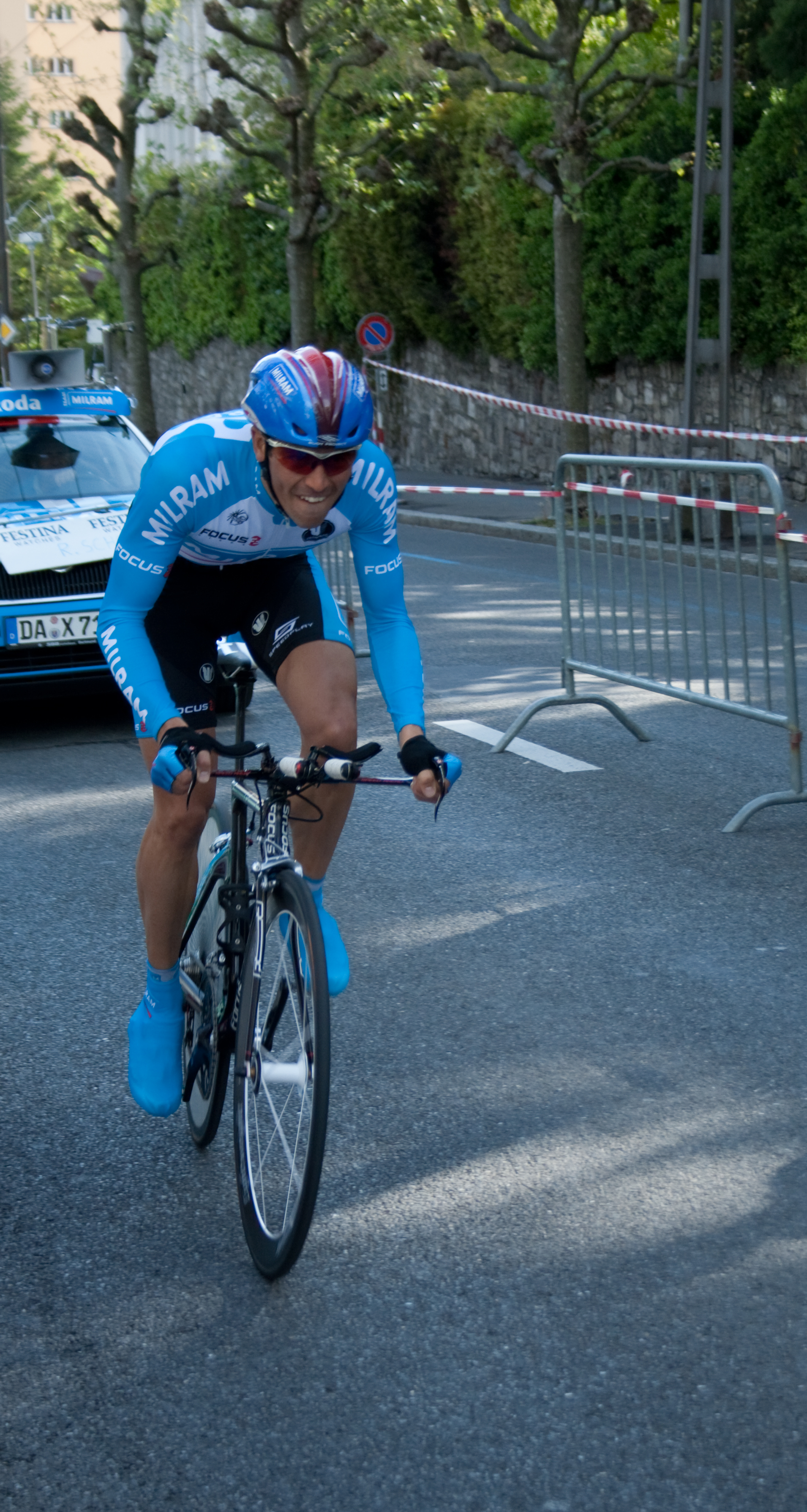 Ronny Scholz lors du prologue du Tour de Romandie 2009